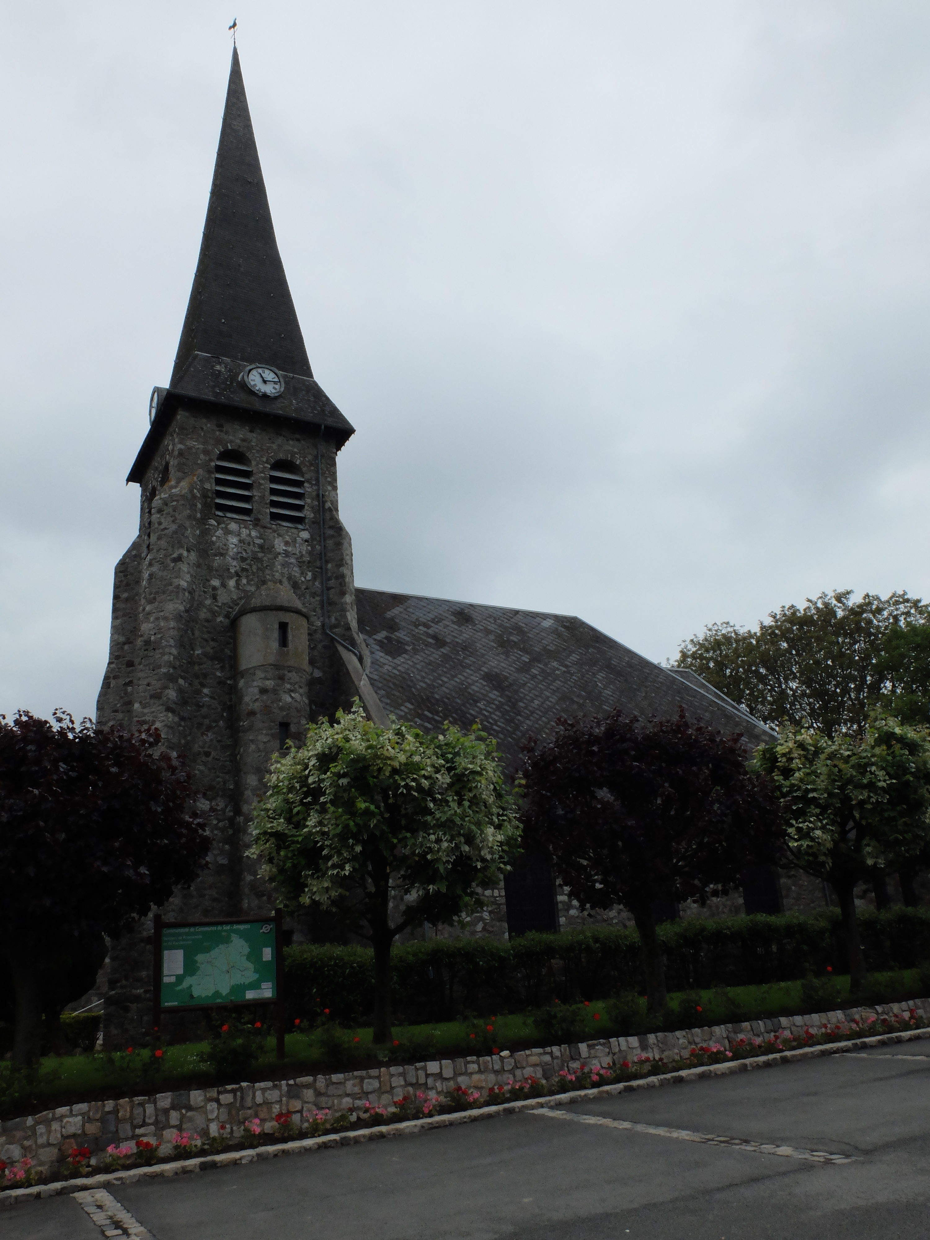 Vue de l'église Saint-Vaast de Bullecourt.